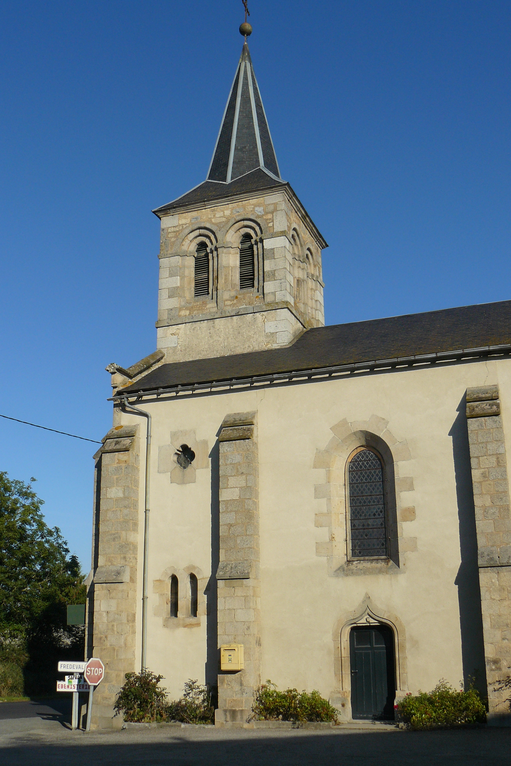 Fontanières (Creuse, France) : Eglise Notre-Dame-de-la-Route